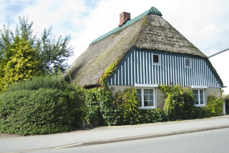 Haus an der Durchfahrtsstraße in Grönland, Sommerland, Schleswig-Holstein